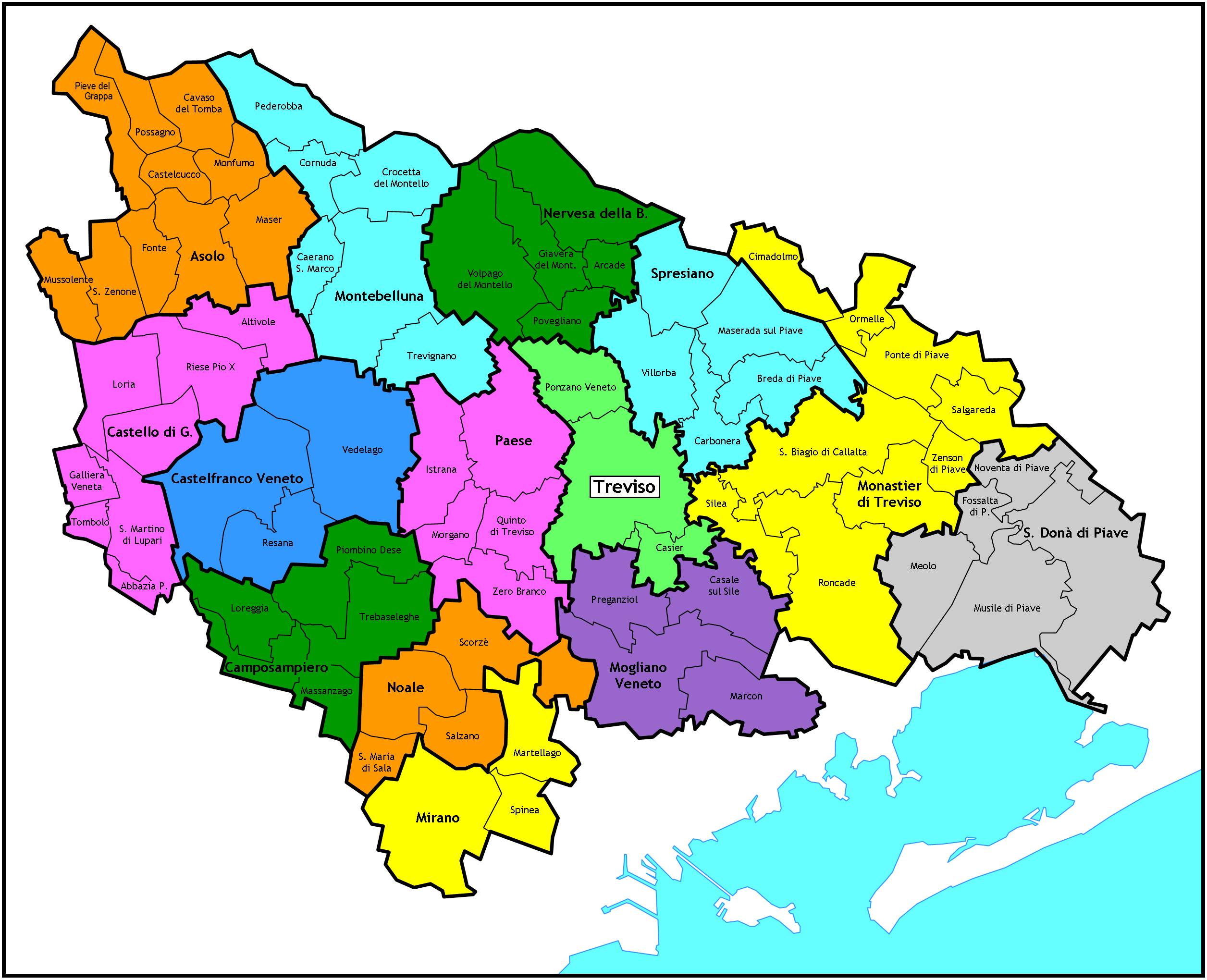 Mappa dei Vicariati della Diocesi di Treviso